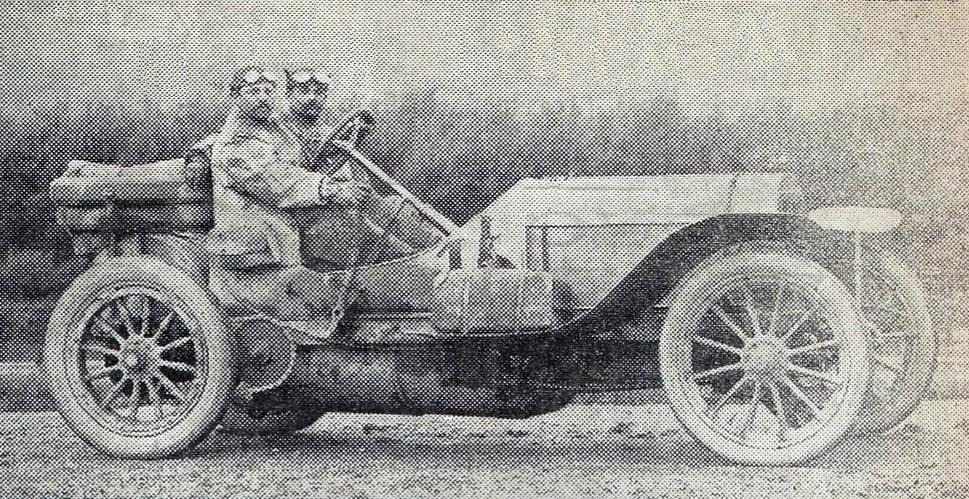 La voiture Mercedes d'Otto Saltzer au Grand Prix de l'ACF 1907.